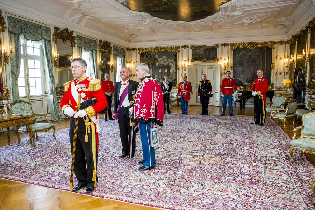 El Embajador del Perú en Suecia, José Beraún Aranibar, presentó ante la Reina Margarita II de Dinamarca Cartas Credenciales que lo acreditan como Embajador concurrente ante ese país. El nombramiento del Embajador concurrente ante Dinamarca, así como la reapertura de la Embajada del Perú en Suecia, se suscriben en el marco de una estrategia desarrollada por el Ministerio de Relaciones Exteriores del Perú para relanzar las relaciones con los países nórdicos. Continúa leyendo la nota en nuestra Web: bit.ly/16H0a3r